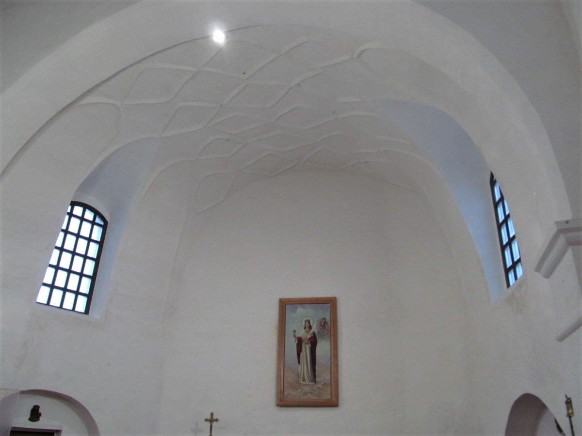 Замосце. Касцёл Святой Барбары. Інтэр'ер